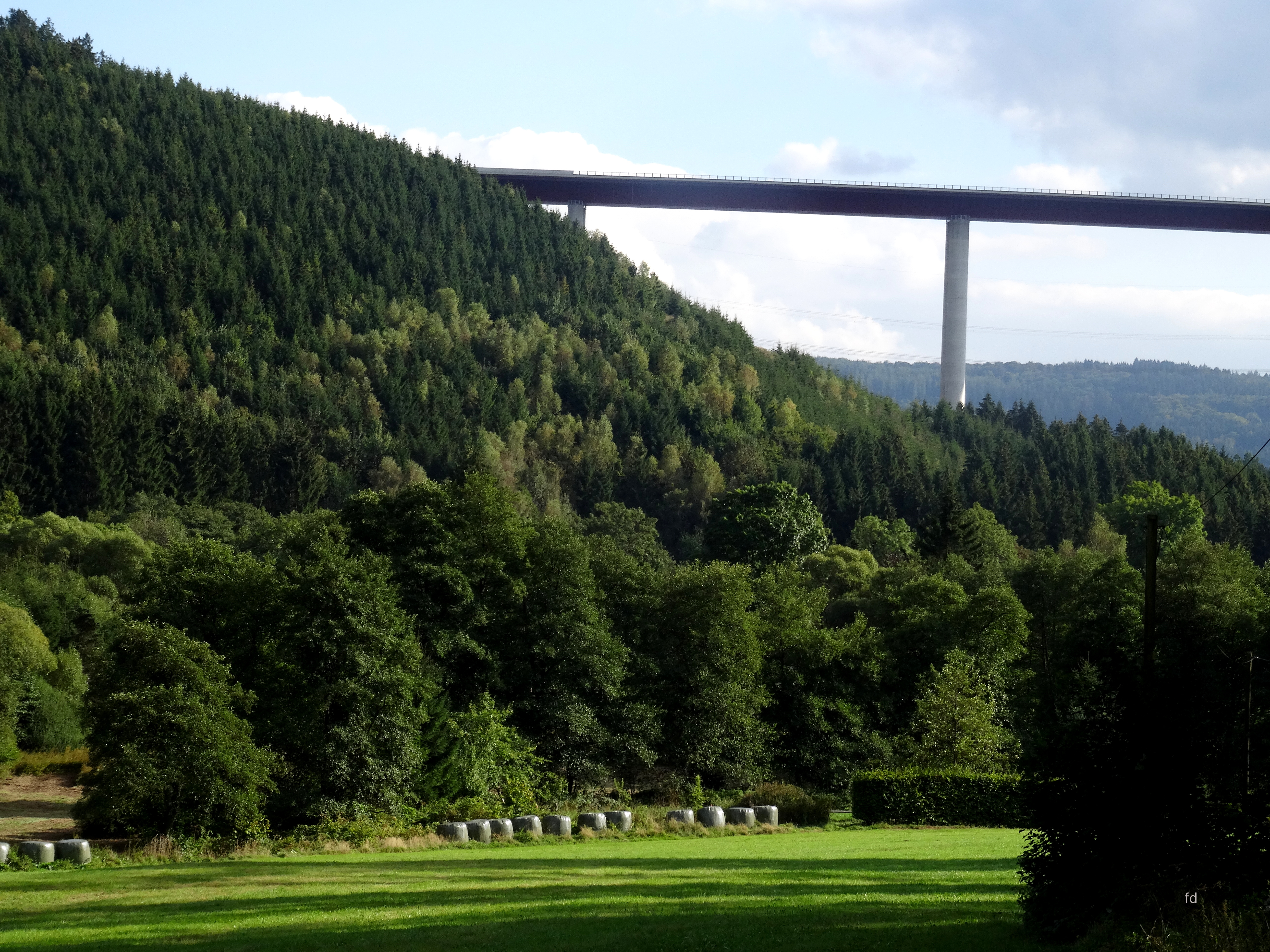 NSG Düsteres Siepen mit Brücke A 46.